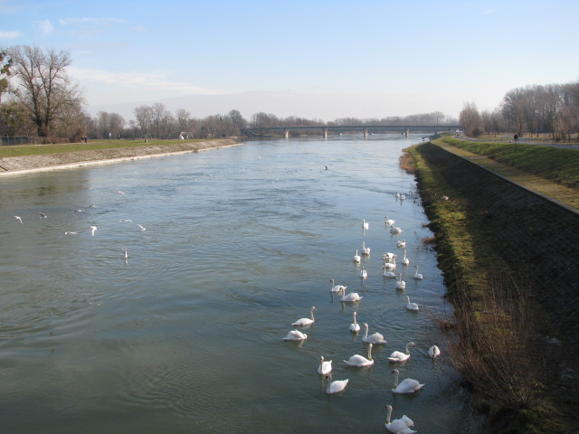 Labudovi na dravi kod Varaždina